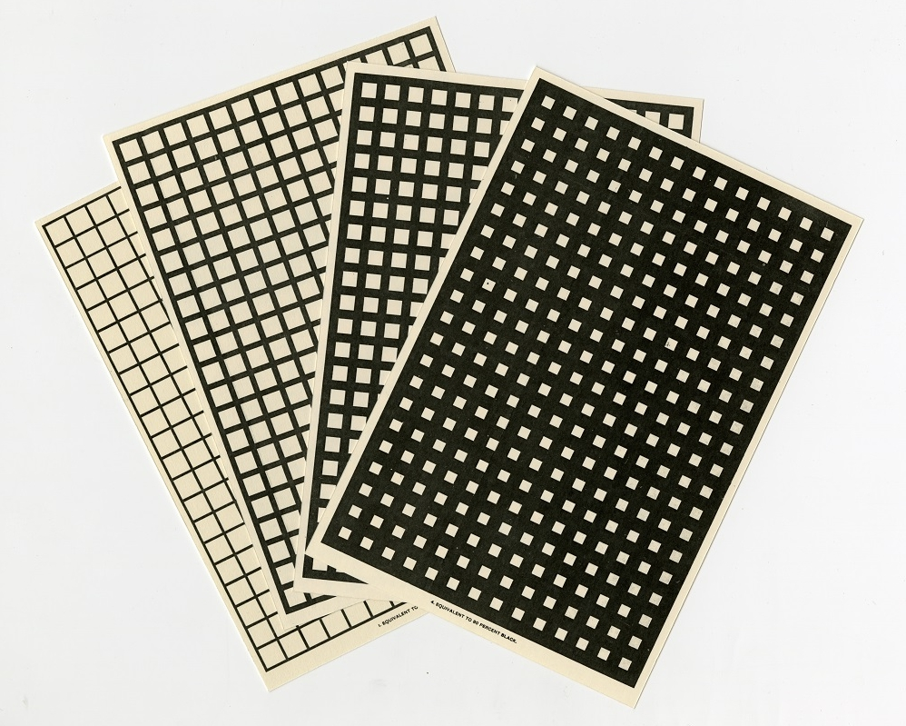 Maximilien Ringelmann Smoke Charts, 1897